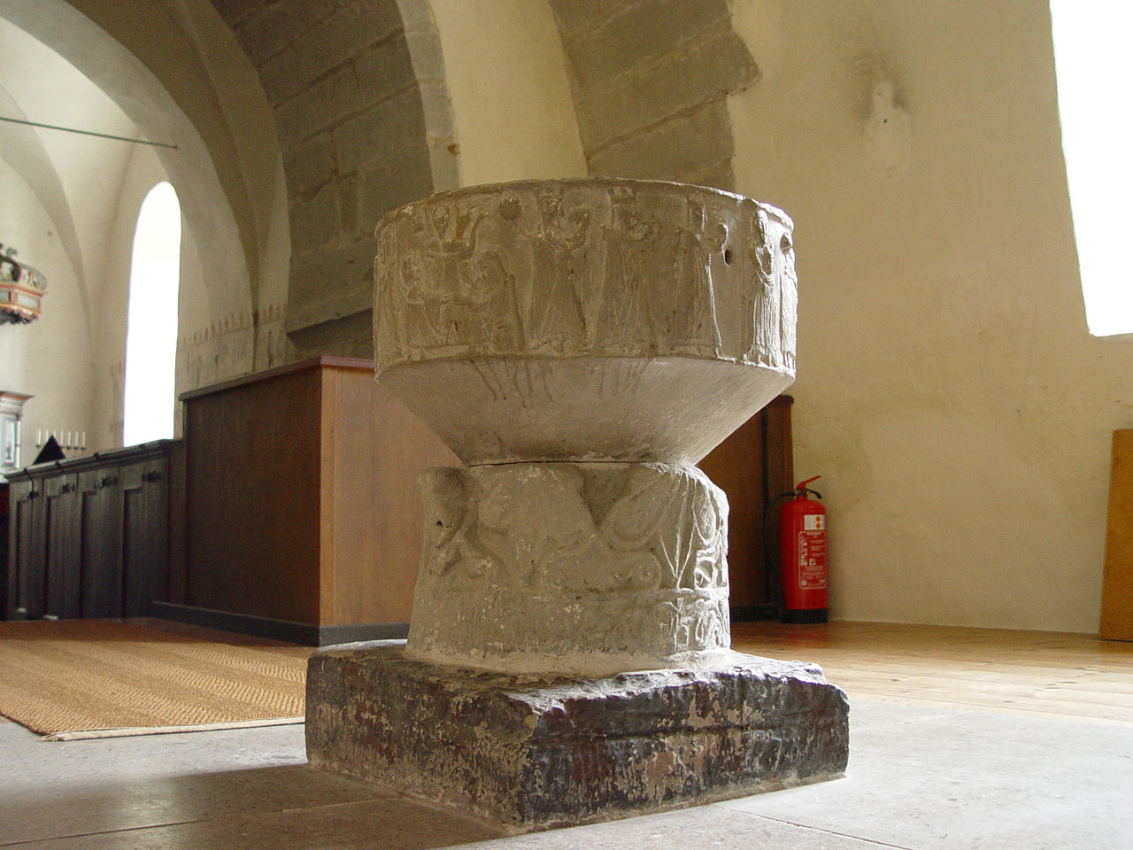 Eke-Kirche auf Gotland. Taufbecken Ende 12 Jh., Arbeit des gotländischen Steinmetz Sigraf